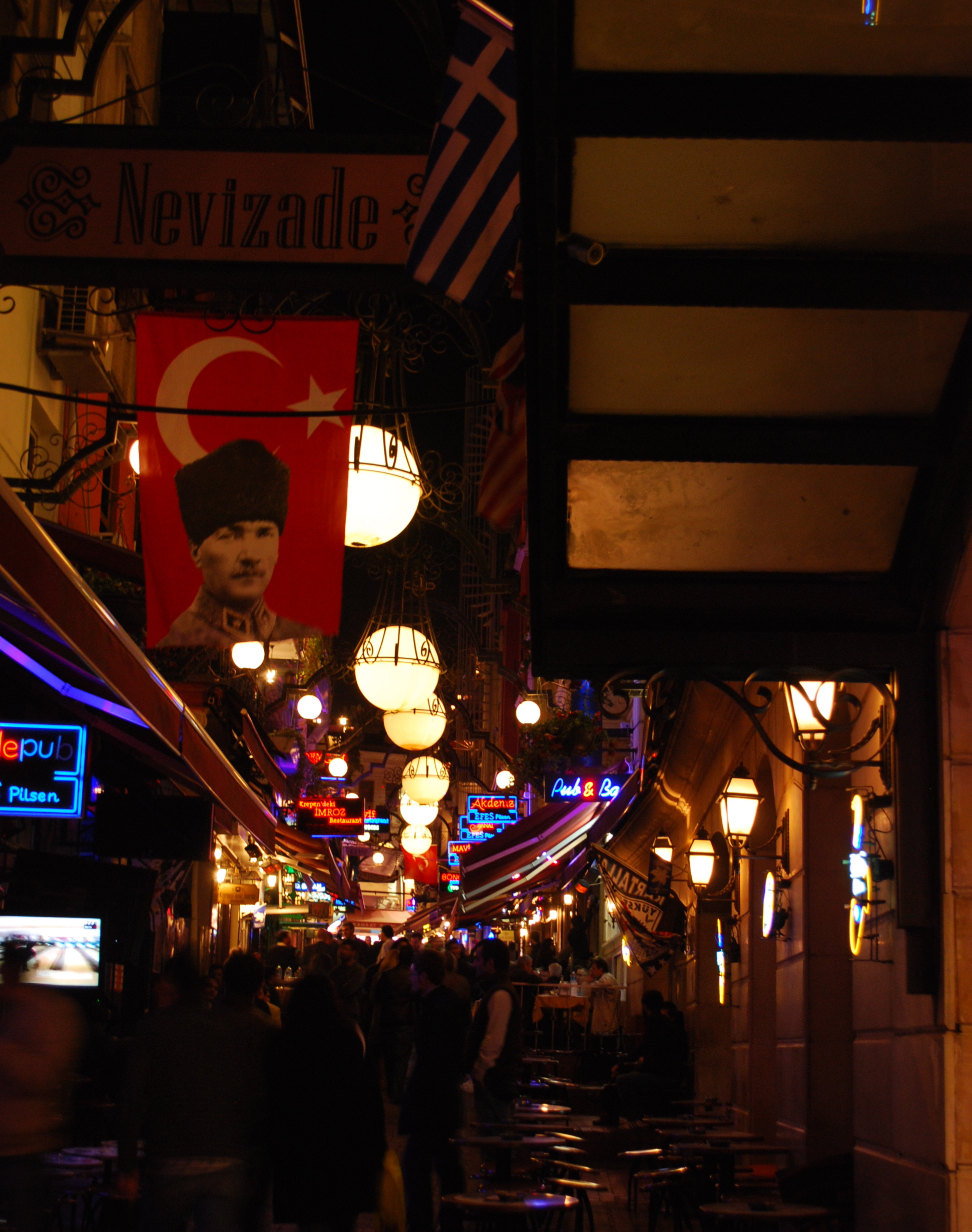 Nevizade Sokak (Nevizade Street), Beyoğlu district in Istanbul.